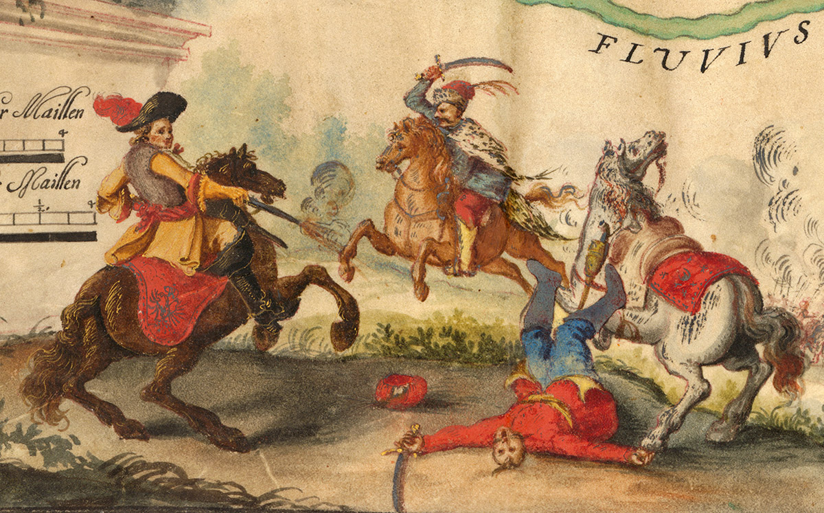 Kuruc labanc összecsapás ábrázolása egy korabeli térképen